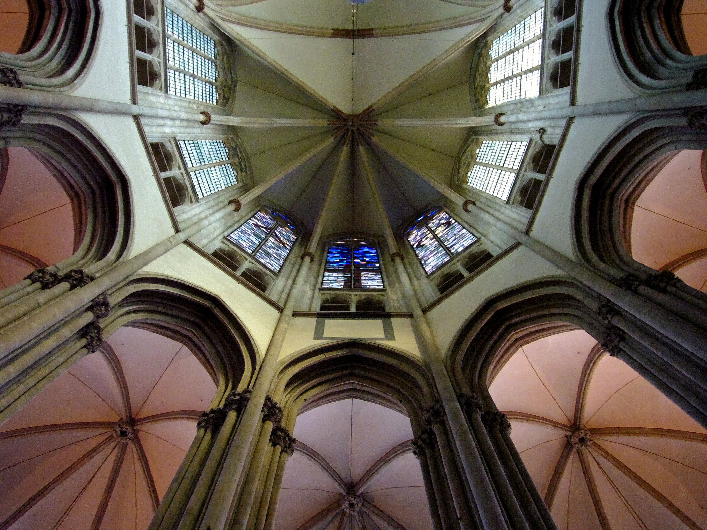 Koorlantaarn Dom te Utrecht